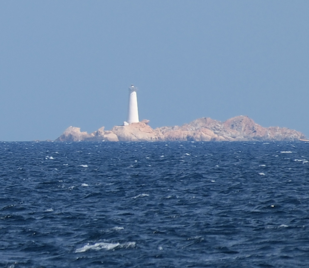 Leuchtturm östlich der Insel Caprera auf Isola dei Monaci, Maddalena Archipel, Nord-Sardinien (41.215995N 9.516907E)